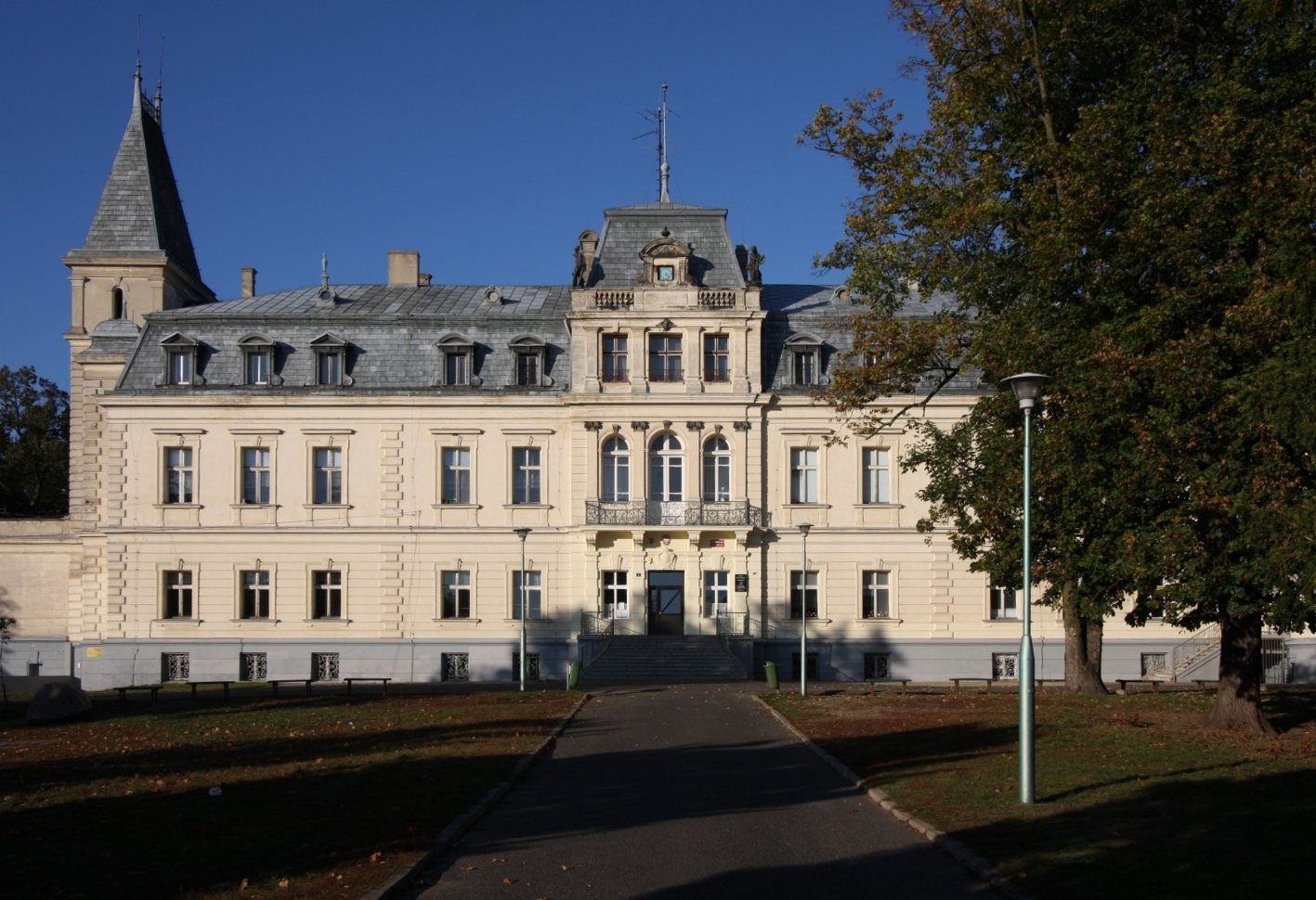 Trzebiechów, pałac, mur., 2 poł. XIX (zabytek nr rejestr. 212)